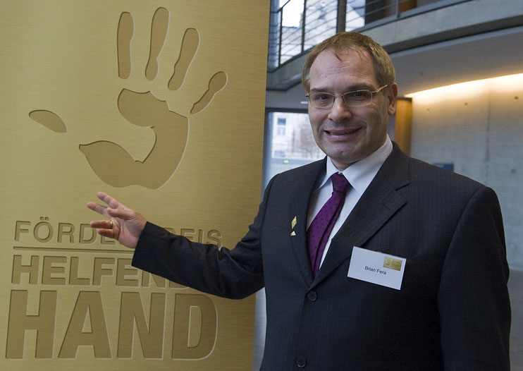 Brian Fera bei der Preisverleihung des Förderpreises „Helfende Hand in Gold“ für die Förderung des ehrenamtlichen Engagements.